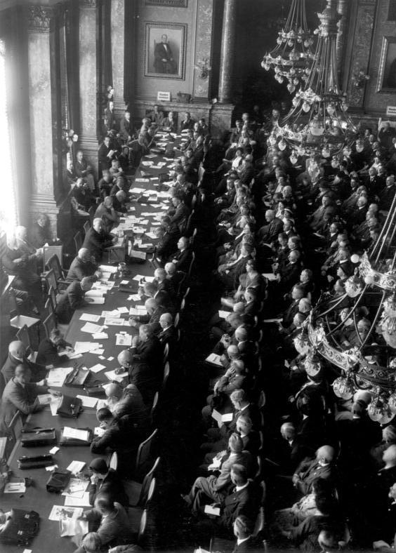 Reichsführertagung der DNVP im Festsaal des Landtags. Geheimrat Dr. Quaatz spricht über Die Wiederherstellung Deutschlands-Unsere Ziele und die Regierung Papen. 31245-32